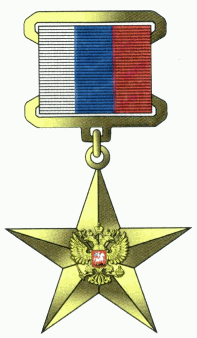 Рисунок знака особого отличия - золотой медали "Герой Труда Российской Федерации"